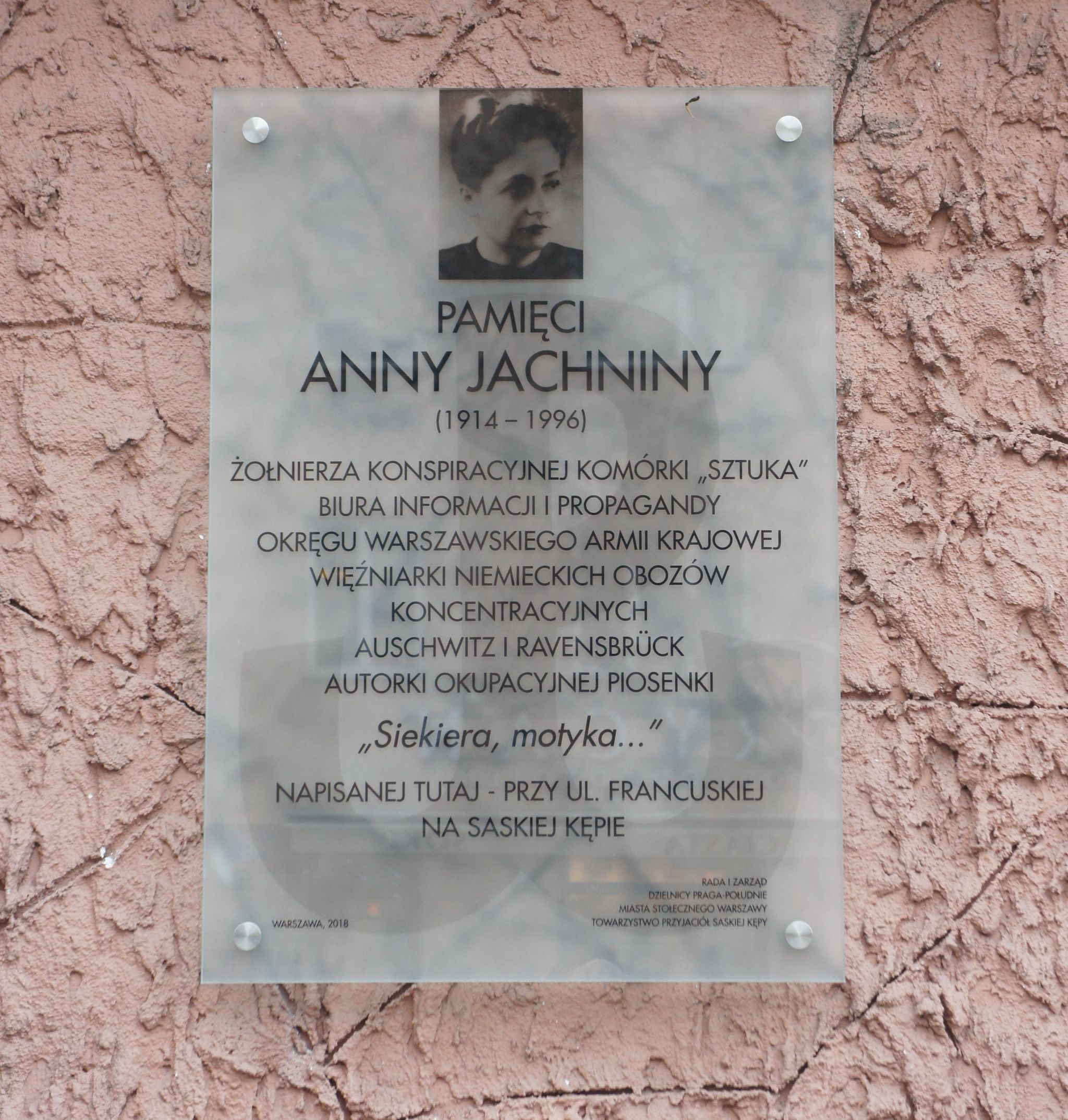 Tablica upamiętniająca Annę Jachninę. Warszawa, Saska Kępa, ul. Francuska 15.